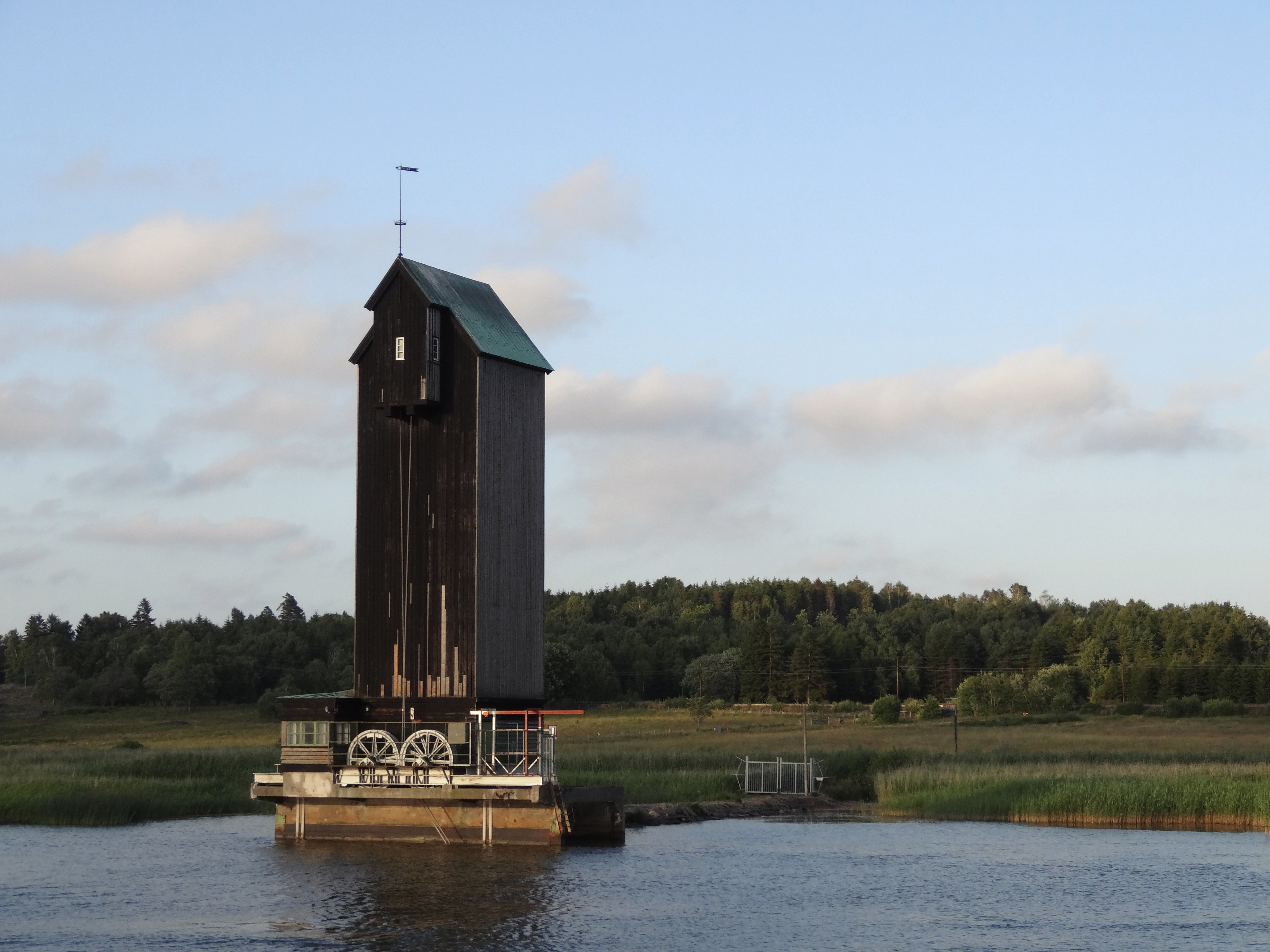 to be filled in later